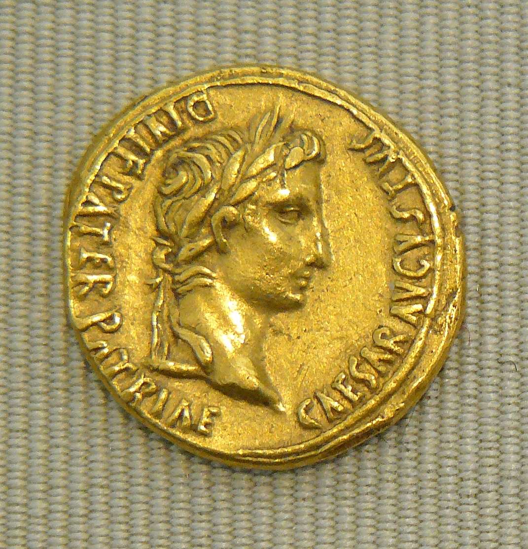 Aureus d'Auguste émis à Lyon, 2 av.JC./4 ap.JC. - Or 7,92 g - BNCMER I 1648 - Cabinet des médailles, Paris